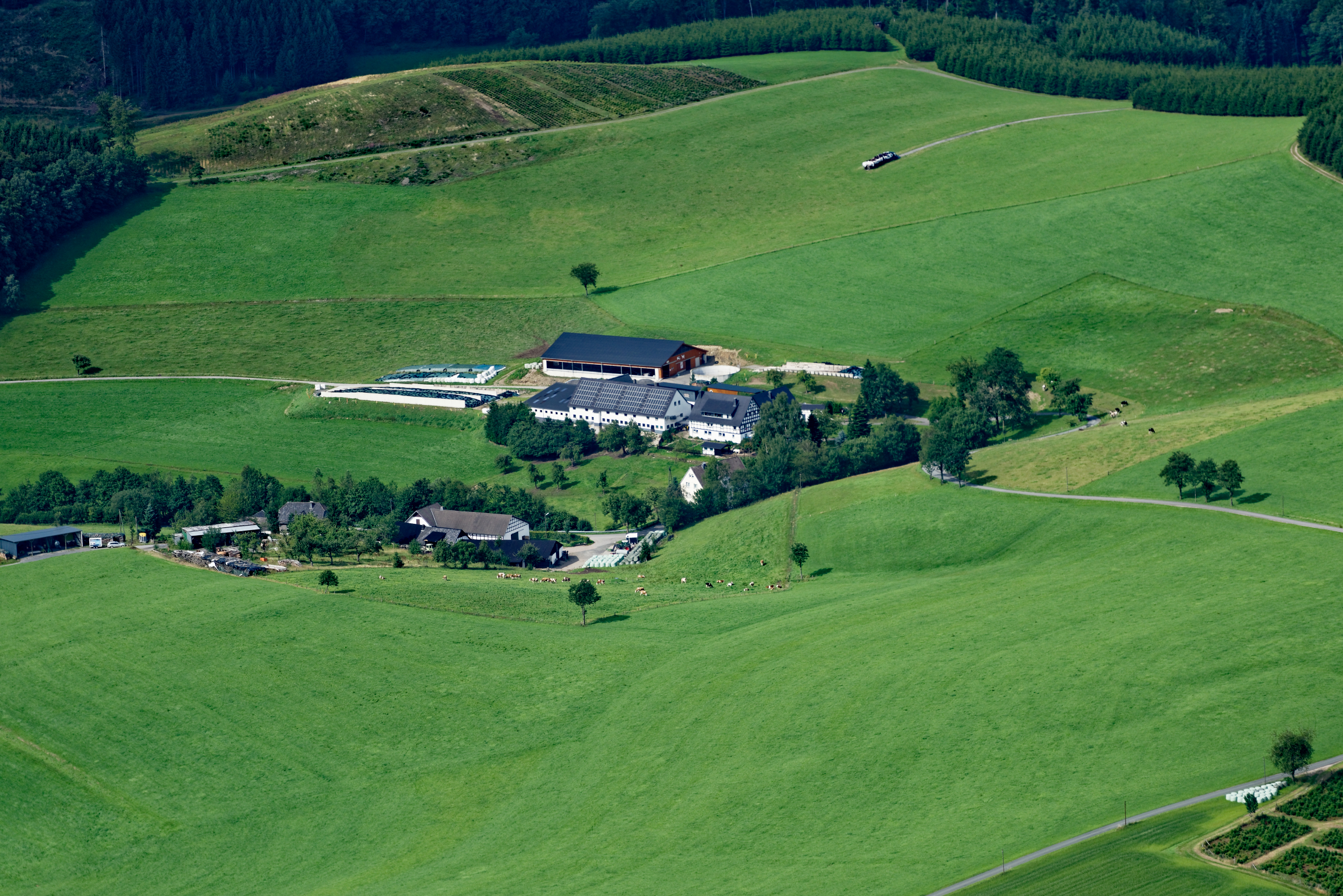 Luftaufnahme: Finnentrop-Wiebelhausen, Nordrhein-Westfalen